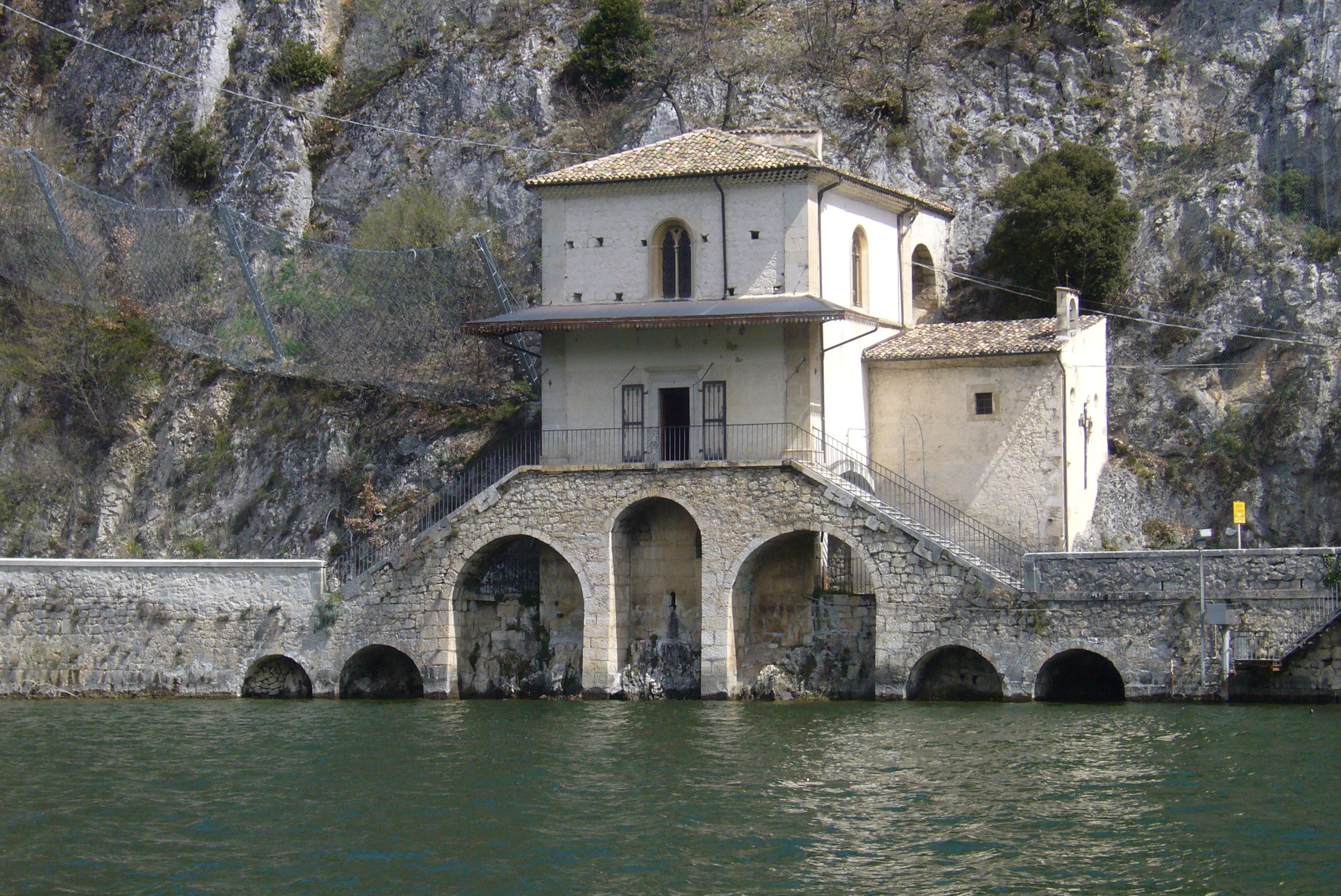 Scanno-Chiesa di Santa Maria del lago